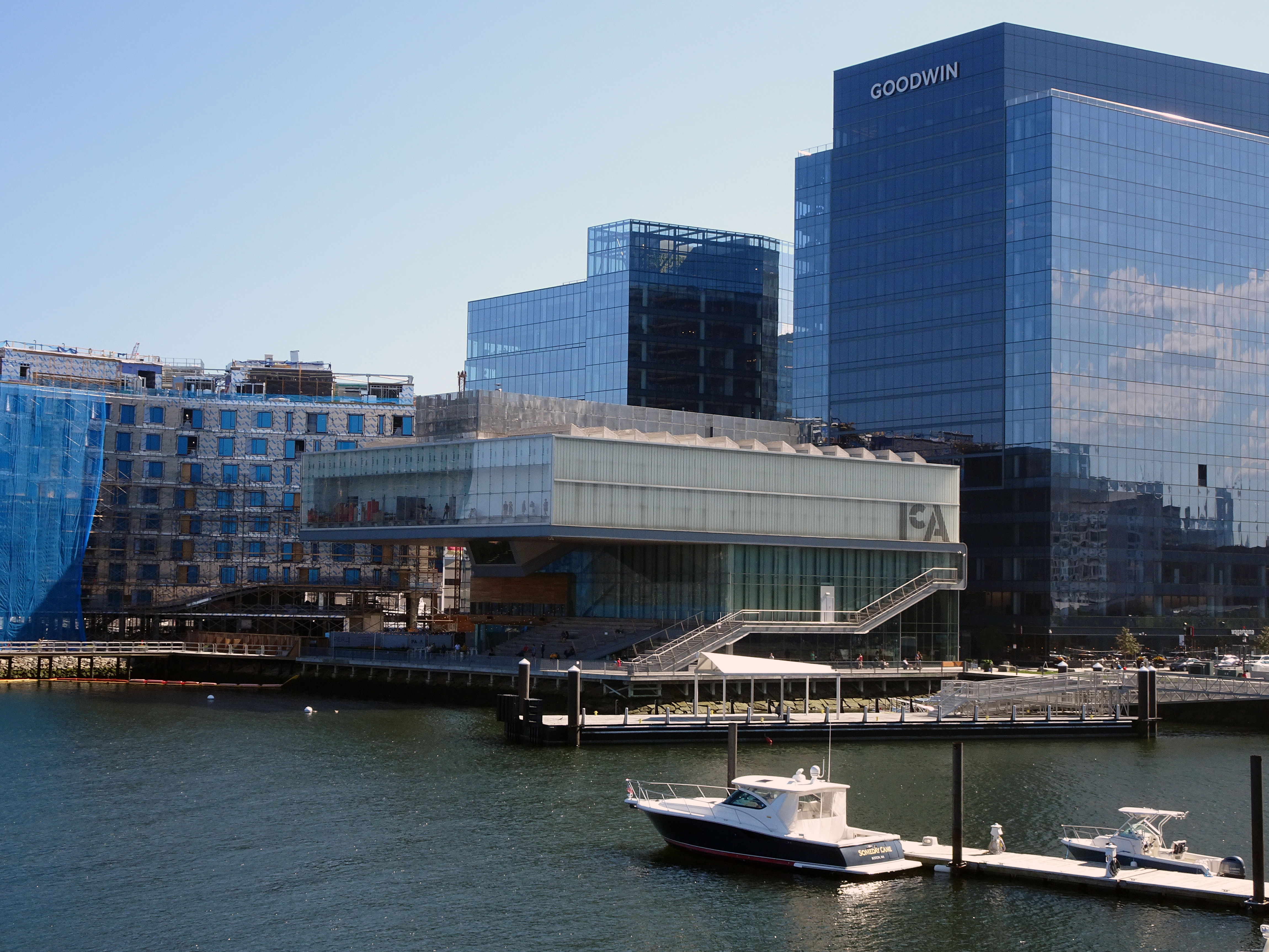 L'Institut d'art contemporain de Boston devant la tour Goodwin